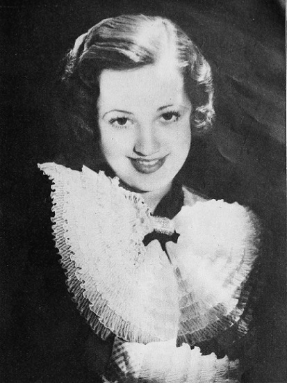 Arline Judge